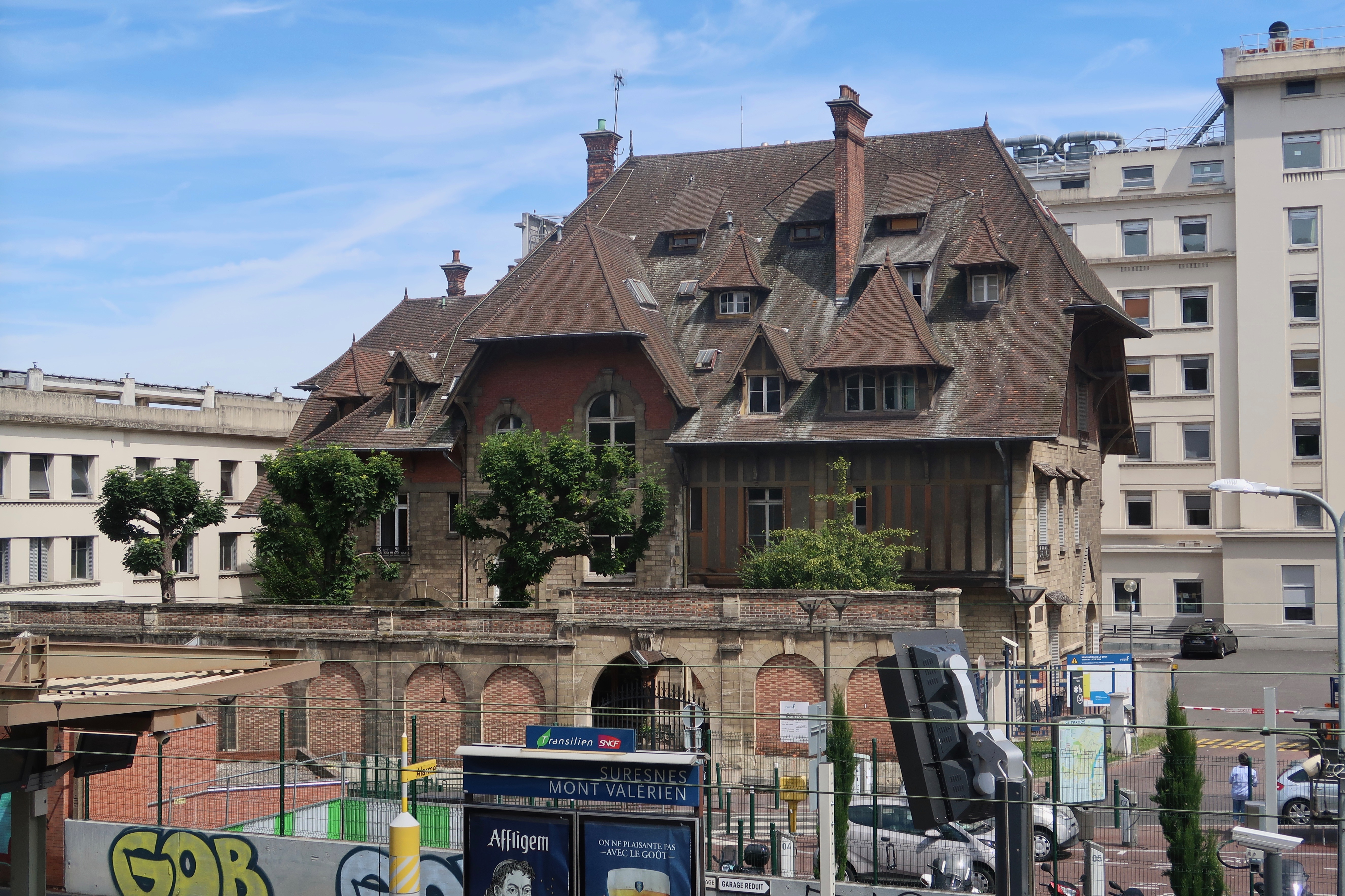 Hôpital Foch (Suresnes).